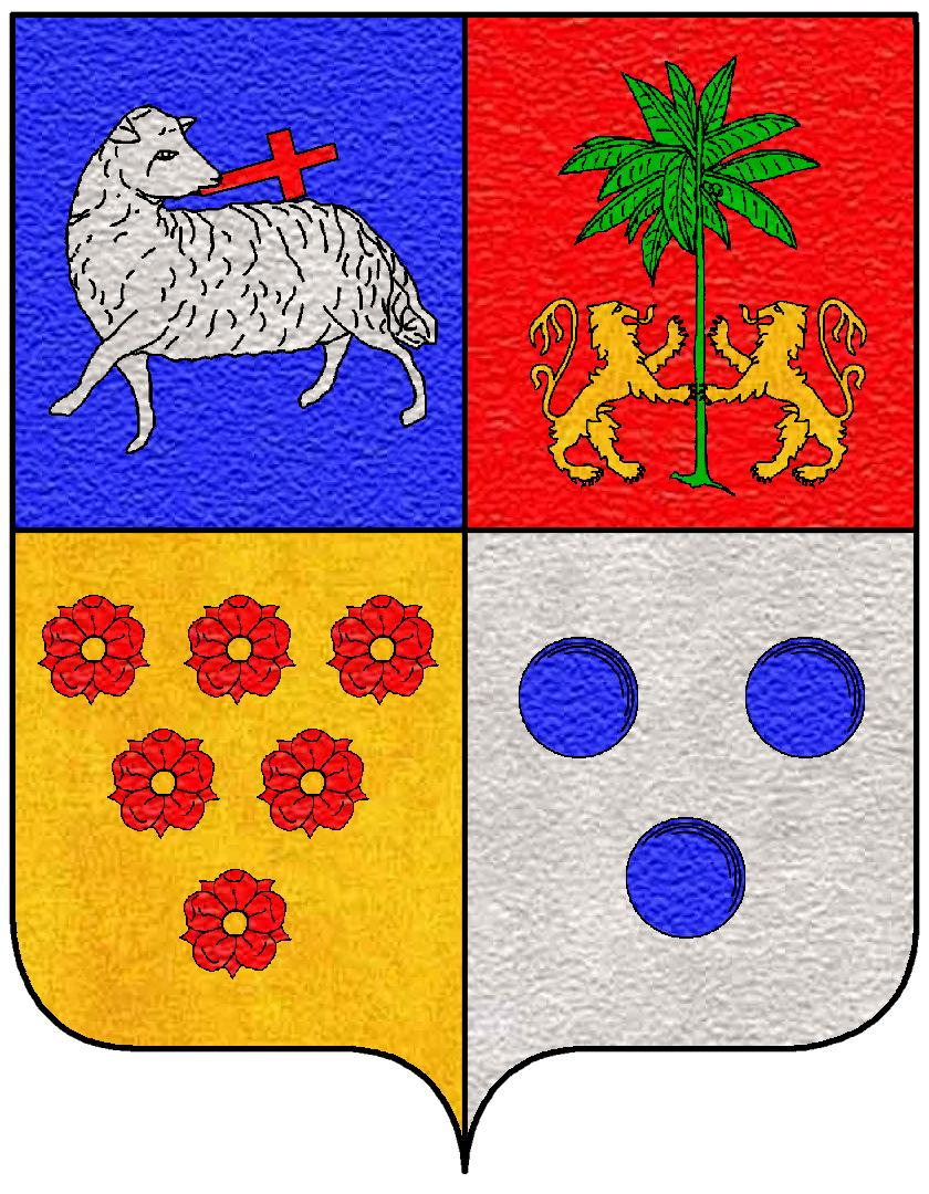 Stemma della famiglia Zacchia